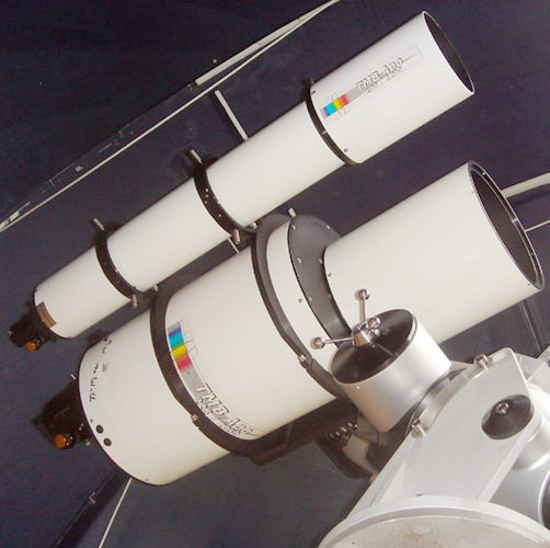 Amateurteleskop als Faltrefraktor